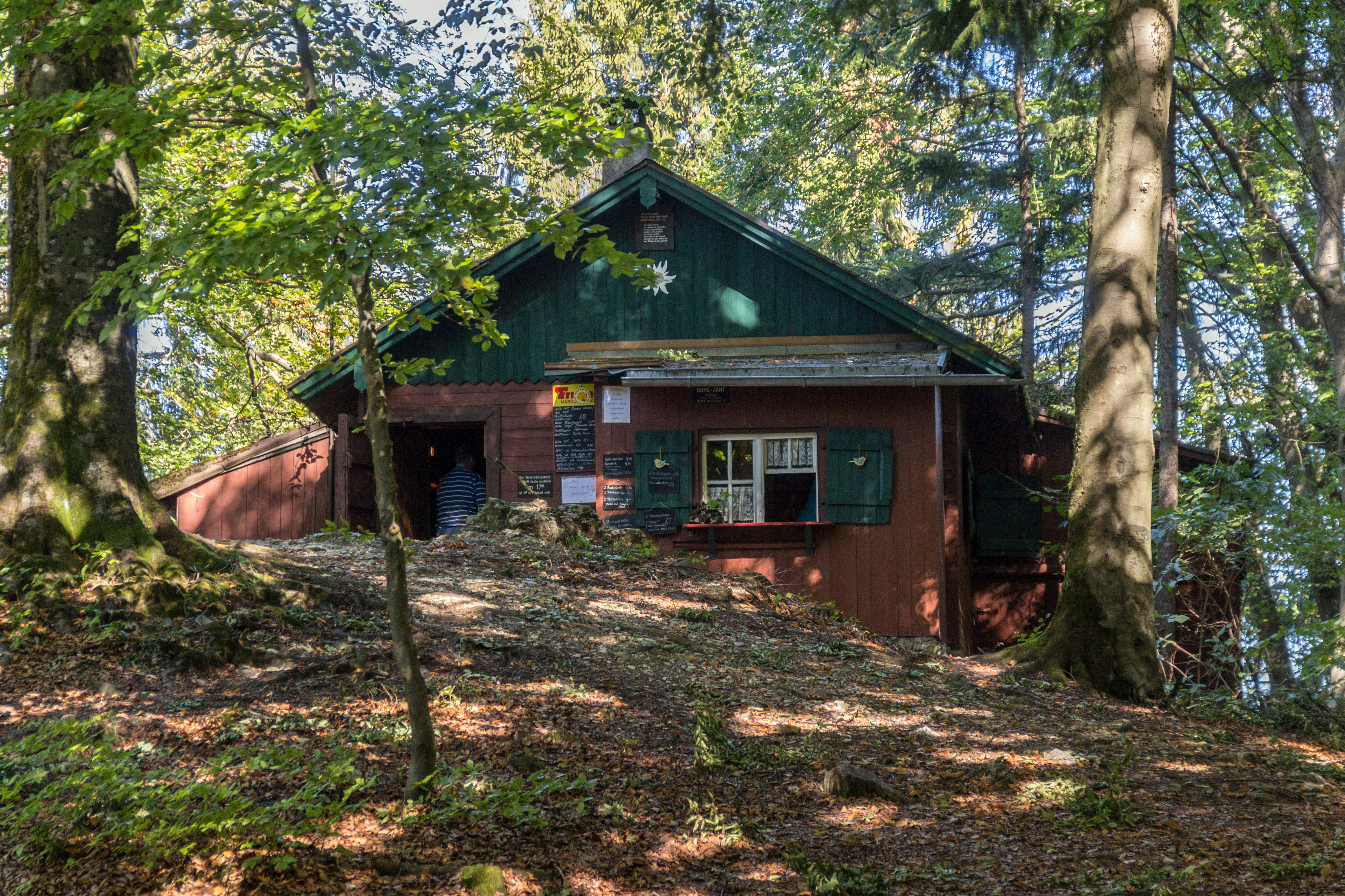 Zantberg, LSG innerhalb des Naturparks Fränkische Schweiz - Veldensteiner Forst (ehemals Schutzzone)